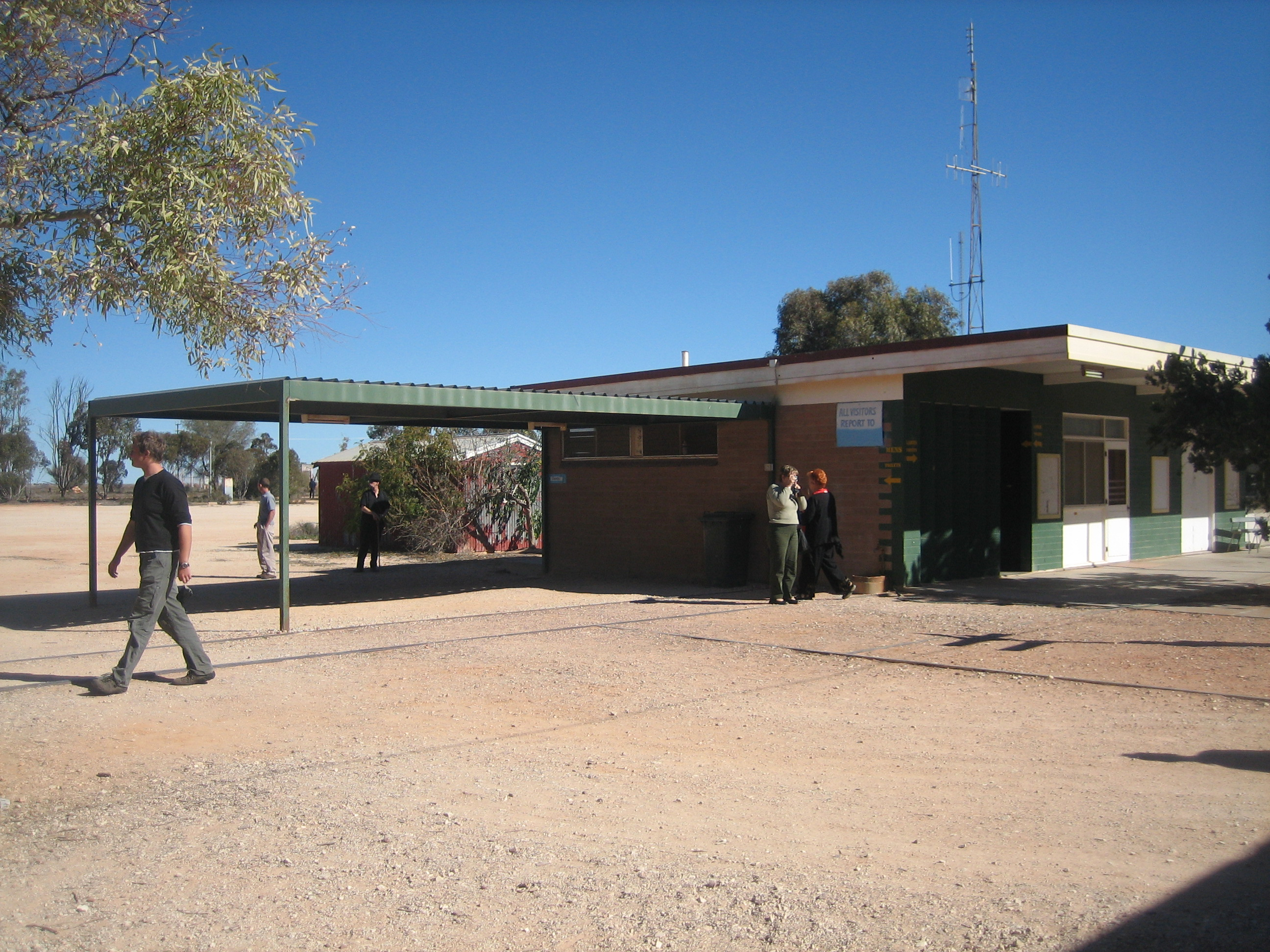 Cook, Australie méridionale: la gare